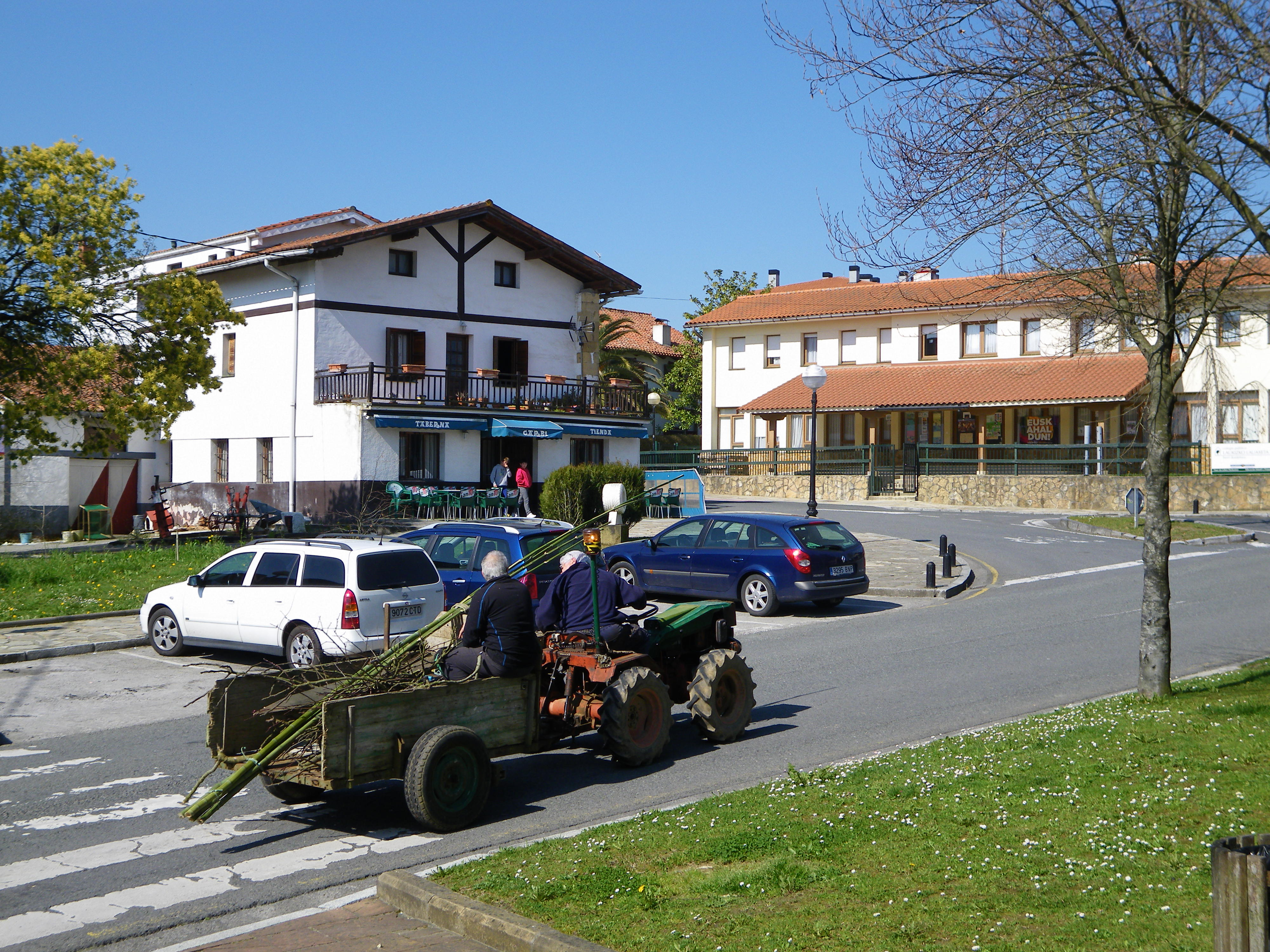 Eleizalde auzoa, Laukiz, Bizkaia, Euskal Herria.